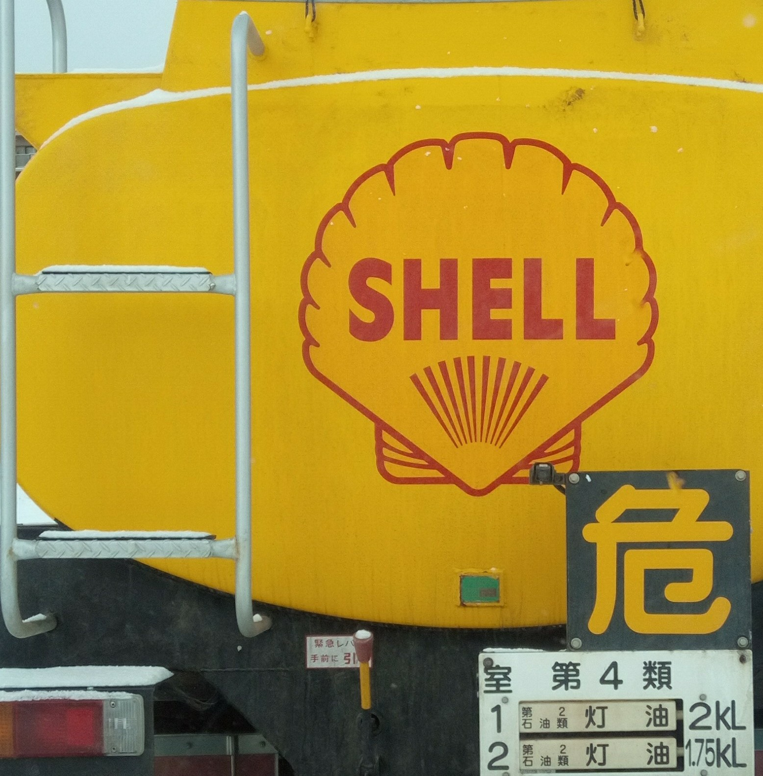 ロイヤルダッジシェル時代のロゴマーク